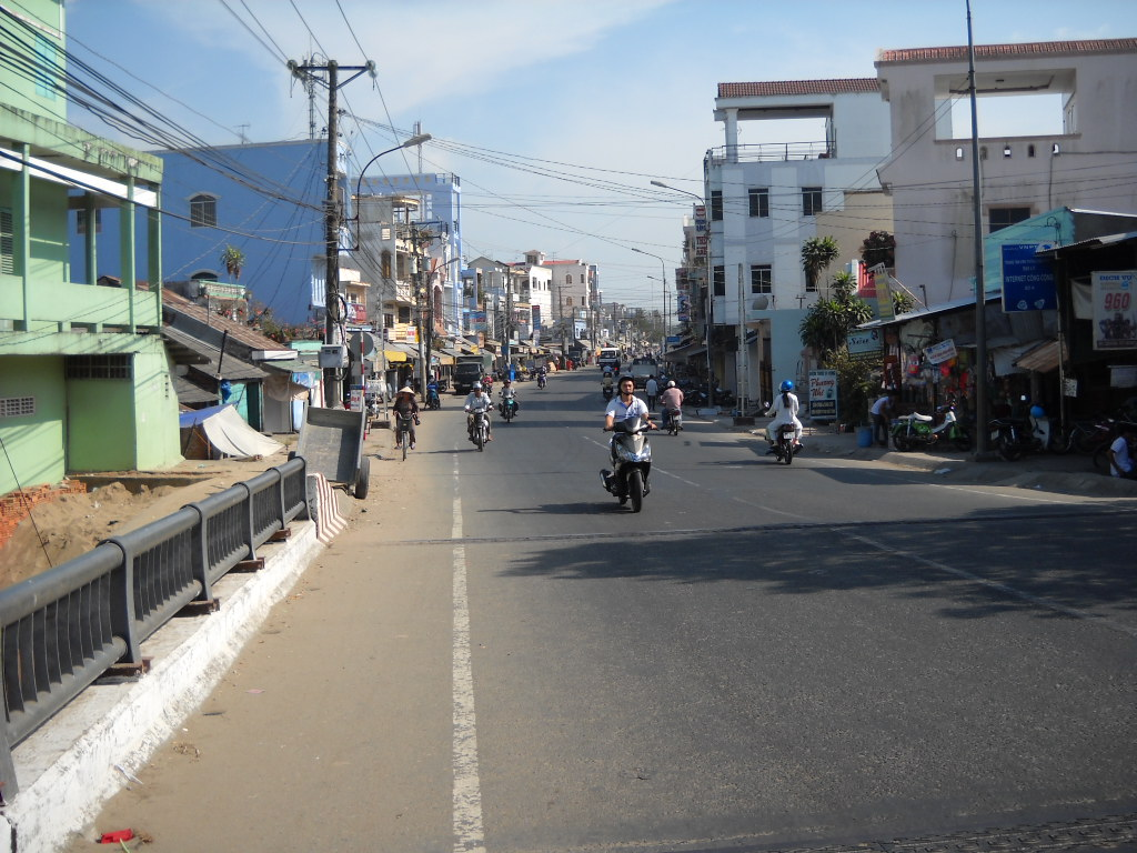 Thị trấn Minh Lương, Châu Thành, Kiên Giang